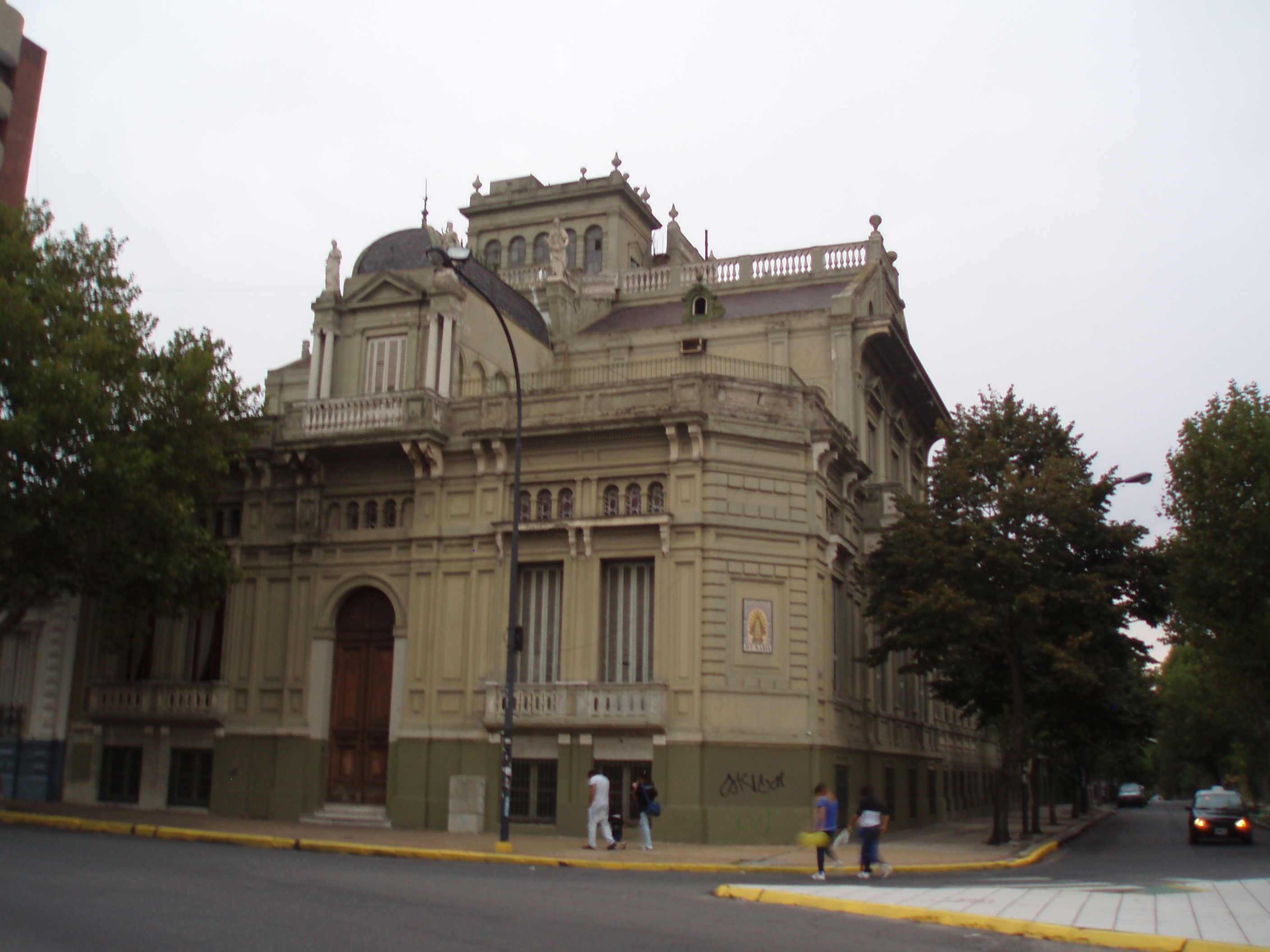 Palacio D'Amico, construido para Carlos D'Amico en 1887, en La Plata. Actual Palacio Arzobispal de La Plata.